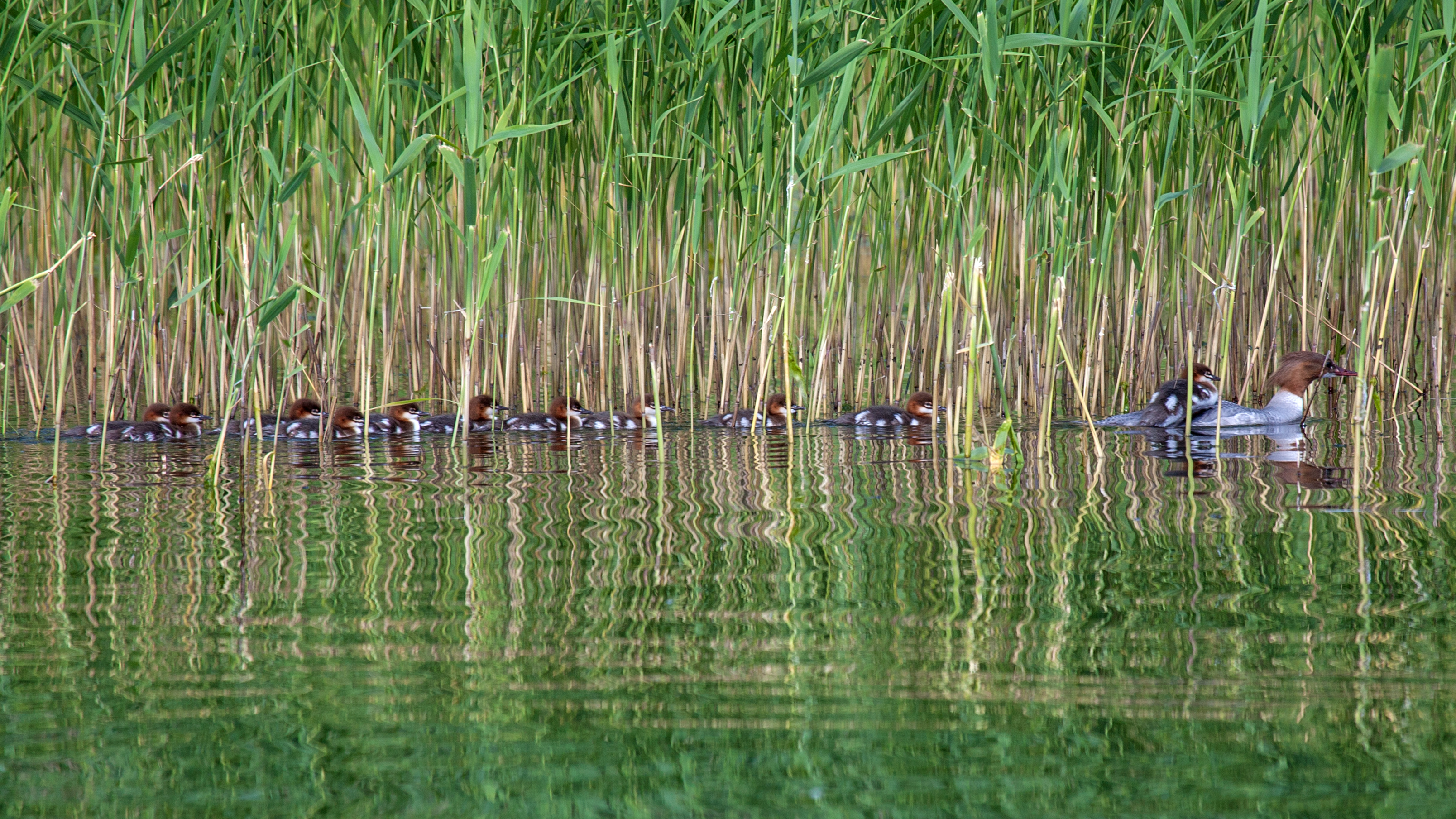 Storskrak, Goosander, Mergus merganser merganser, Vaxholm, Stockholm, Sweden